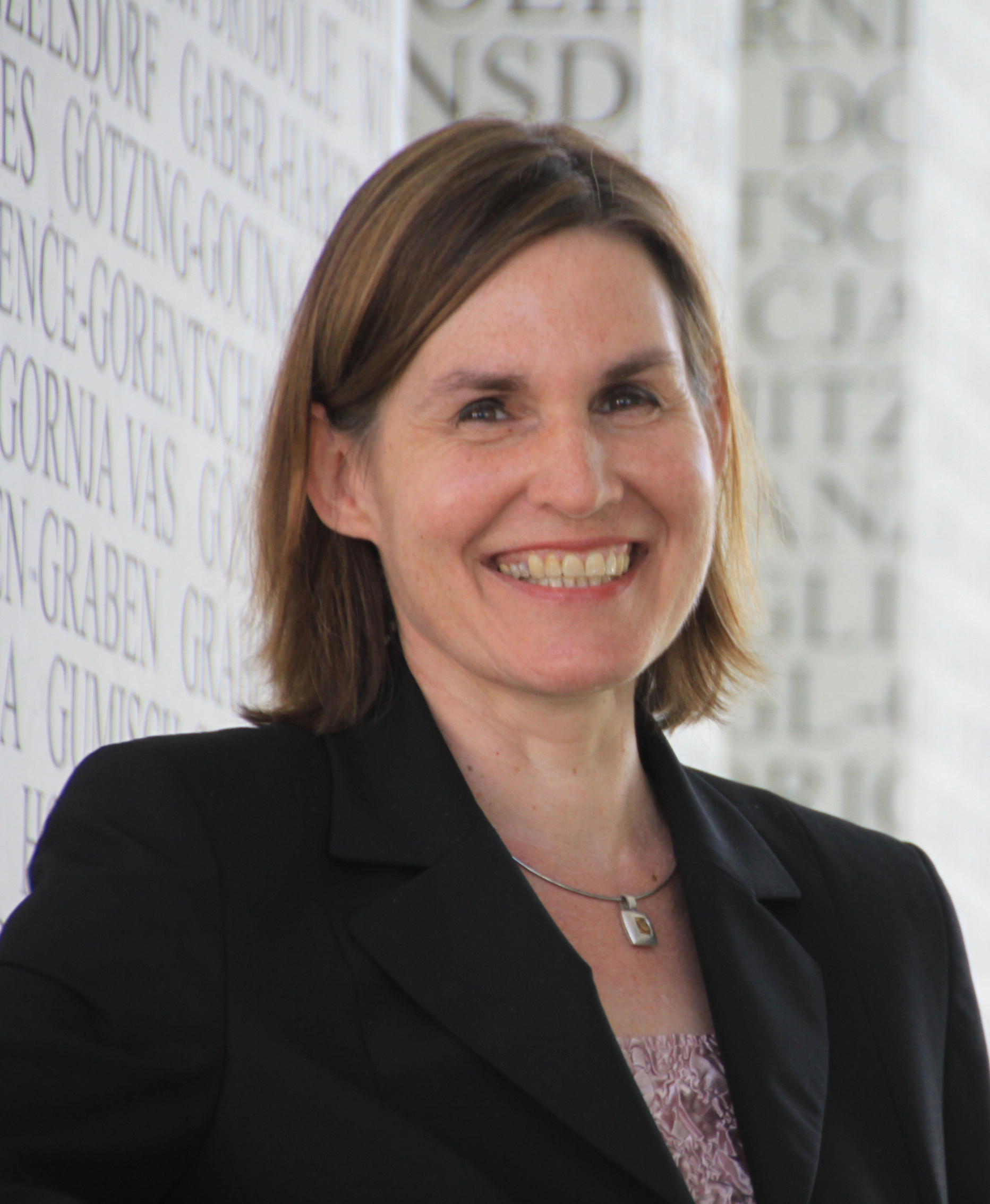 Heike Egner, Klagenfurt 2015